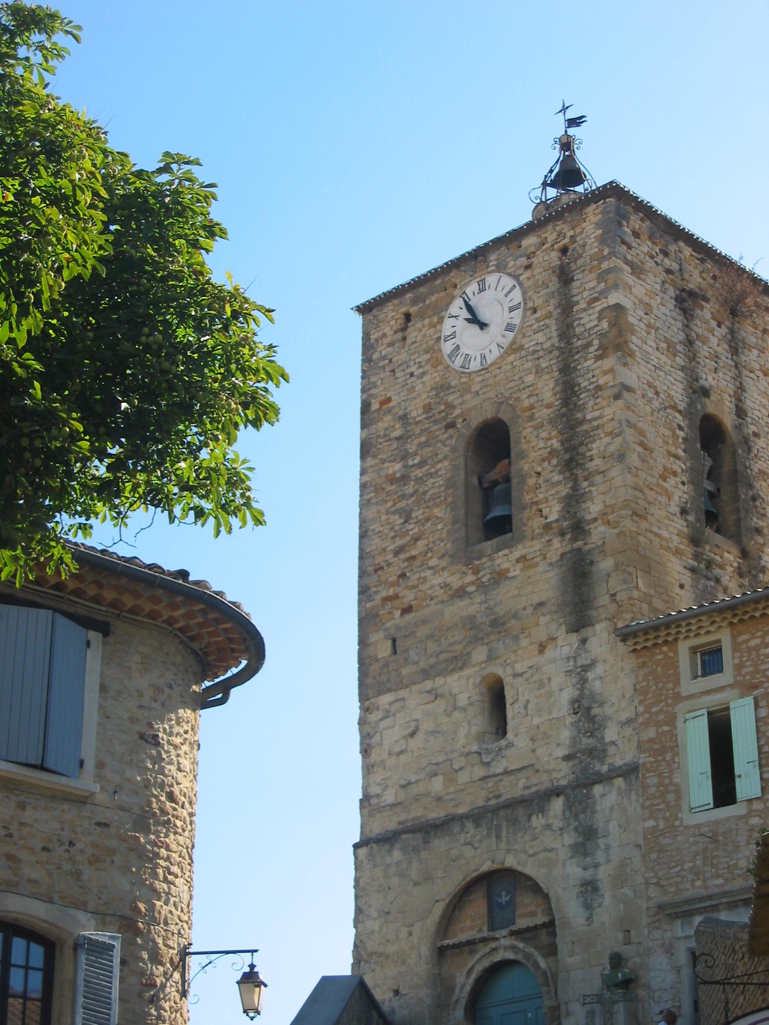 Clocher église de Piolenc (Vaucluse)